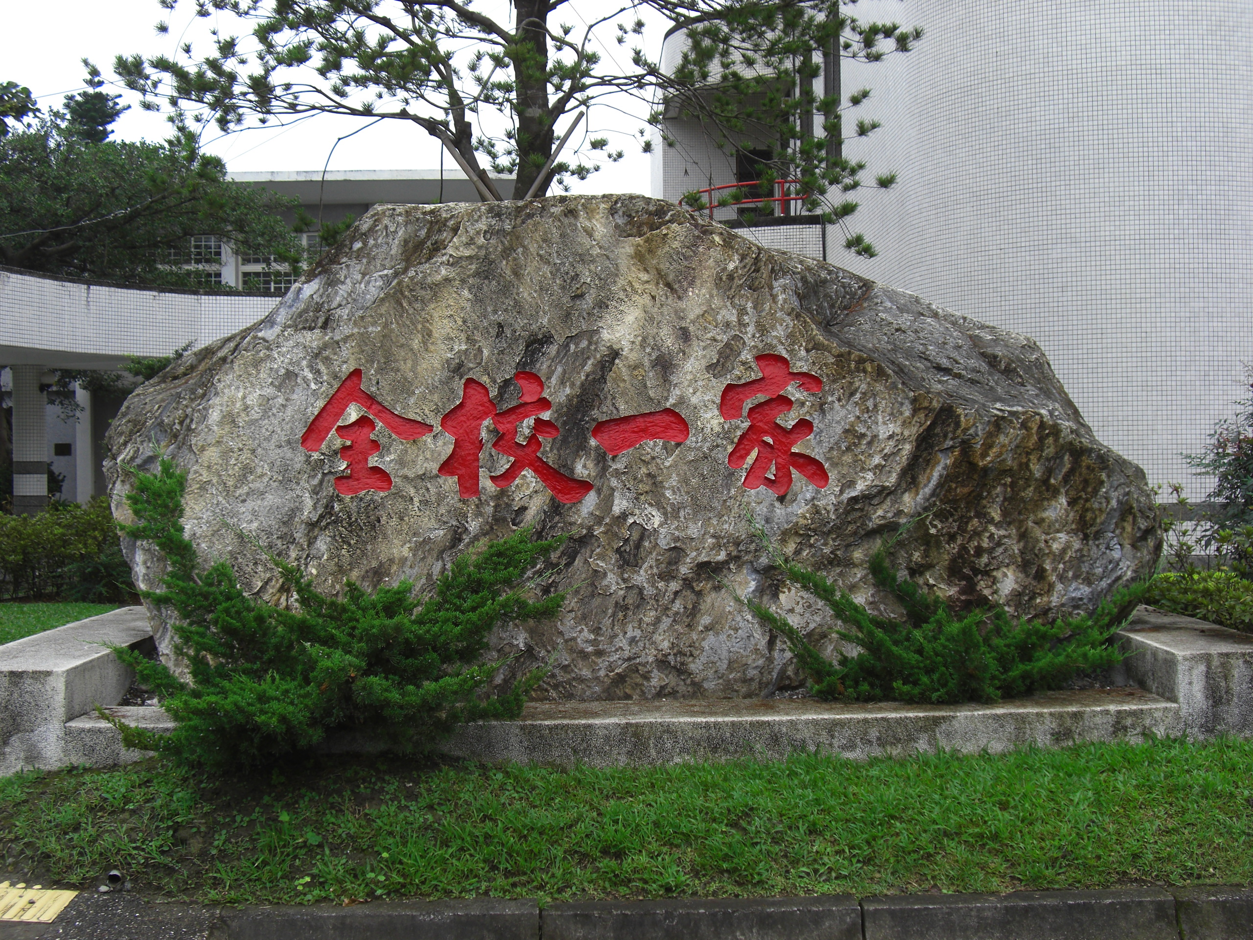 中文（台灣）: 宜蘭高中校訓石。